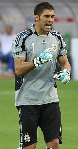 Mariano Gonzalo Andújar